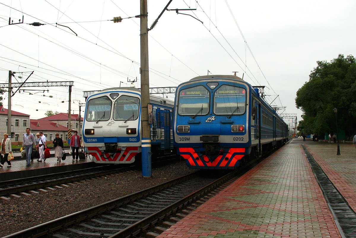 Электропоезда ЭД9МК-0100 и ЭД9М-0202 Россия, Еврейская автономная область, станция Биробиджан-I